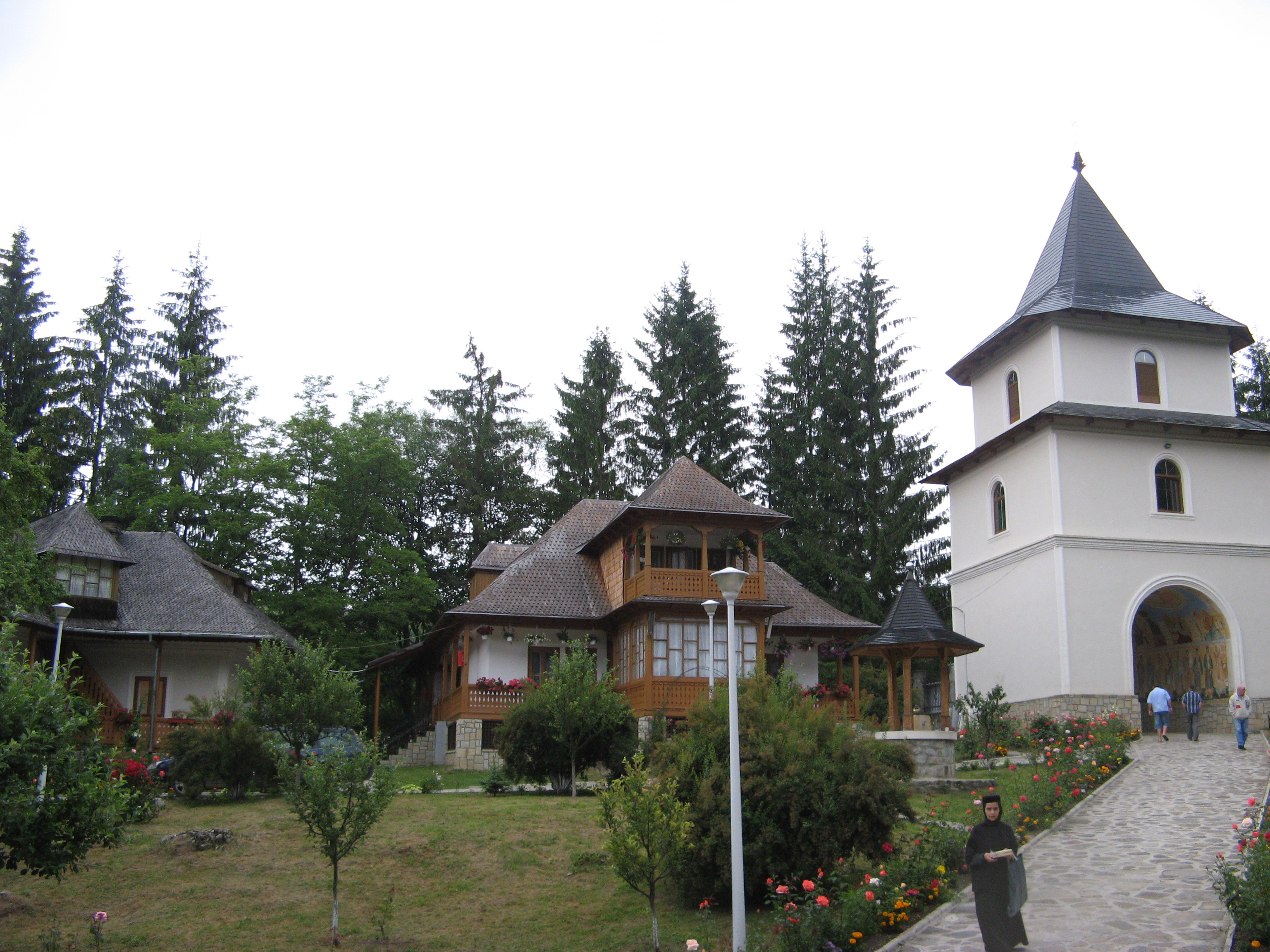 Mănăstirea Durău - intrare